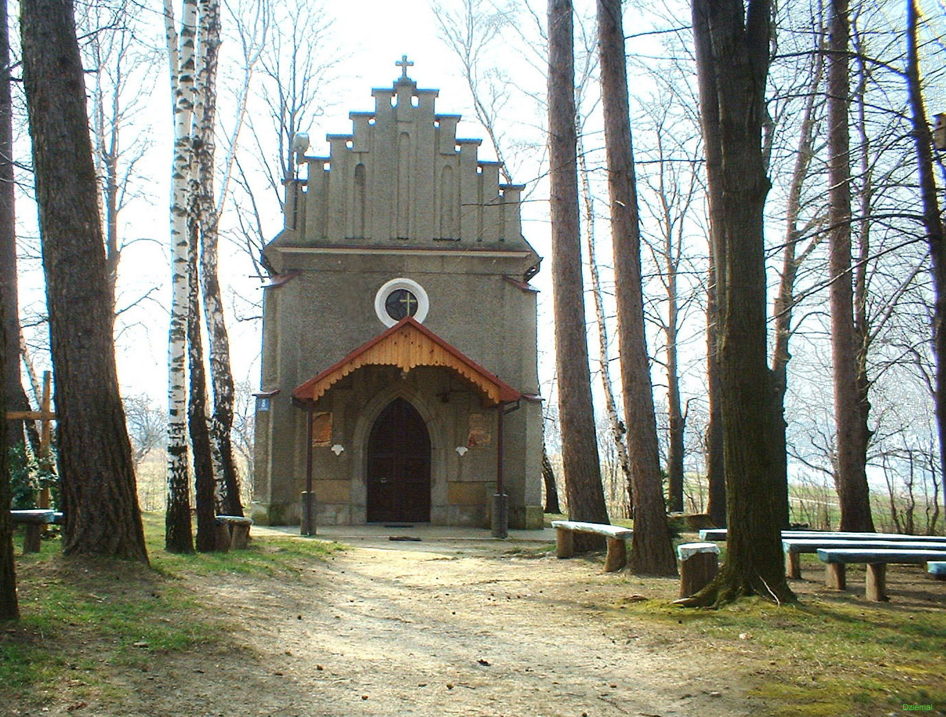 Kaplica św. Rozalii we Wrocance